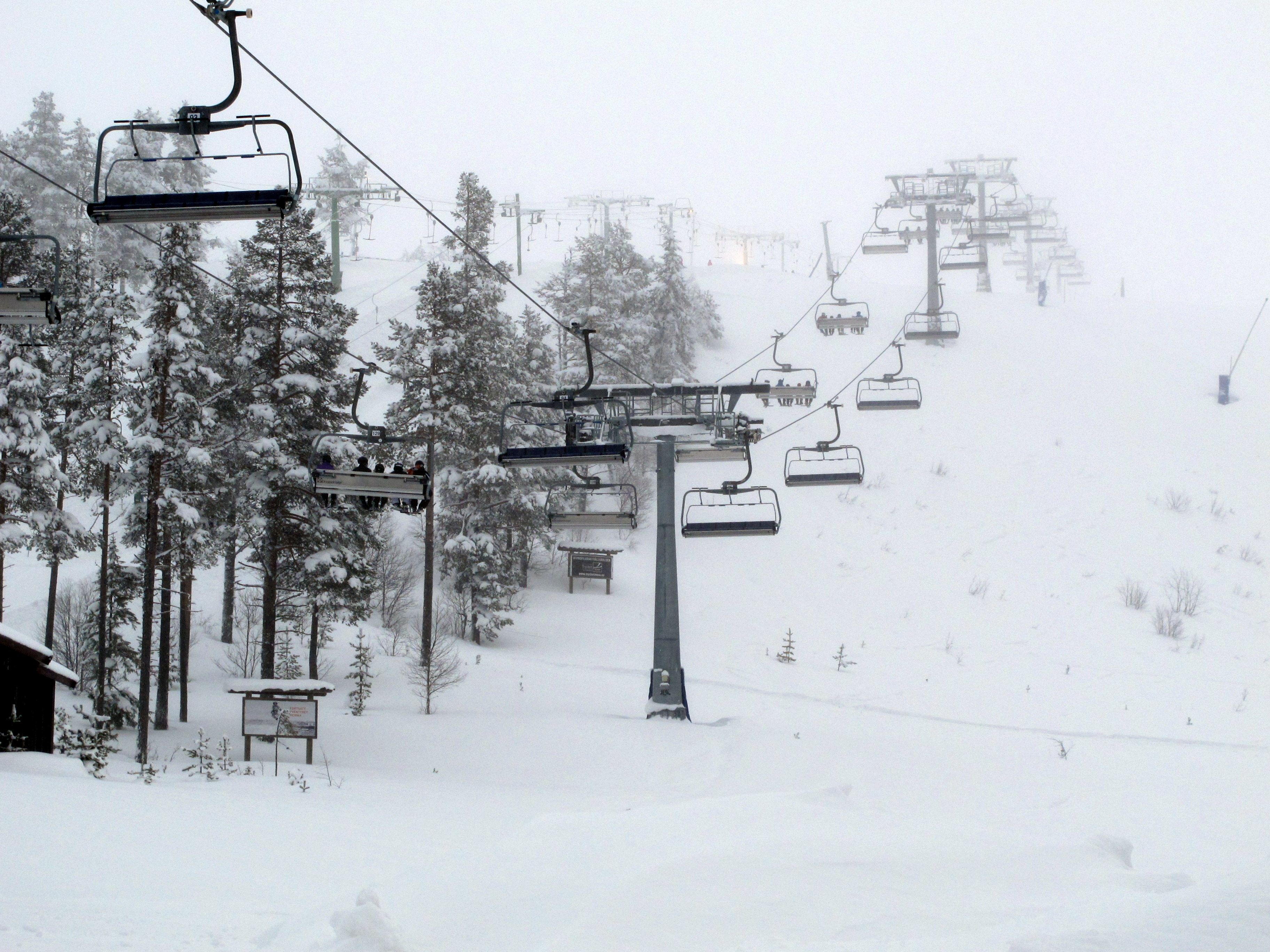 Skidlift i Idre fjäll.